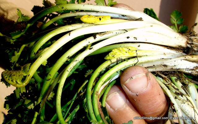 نباتات برّية سورية تؤكل